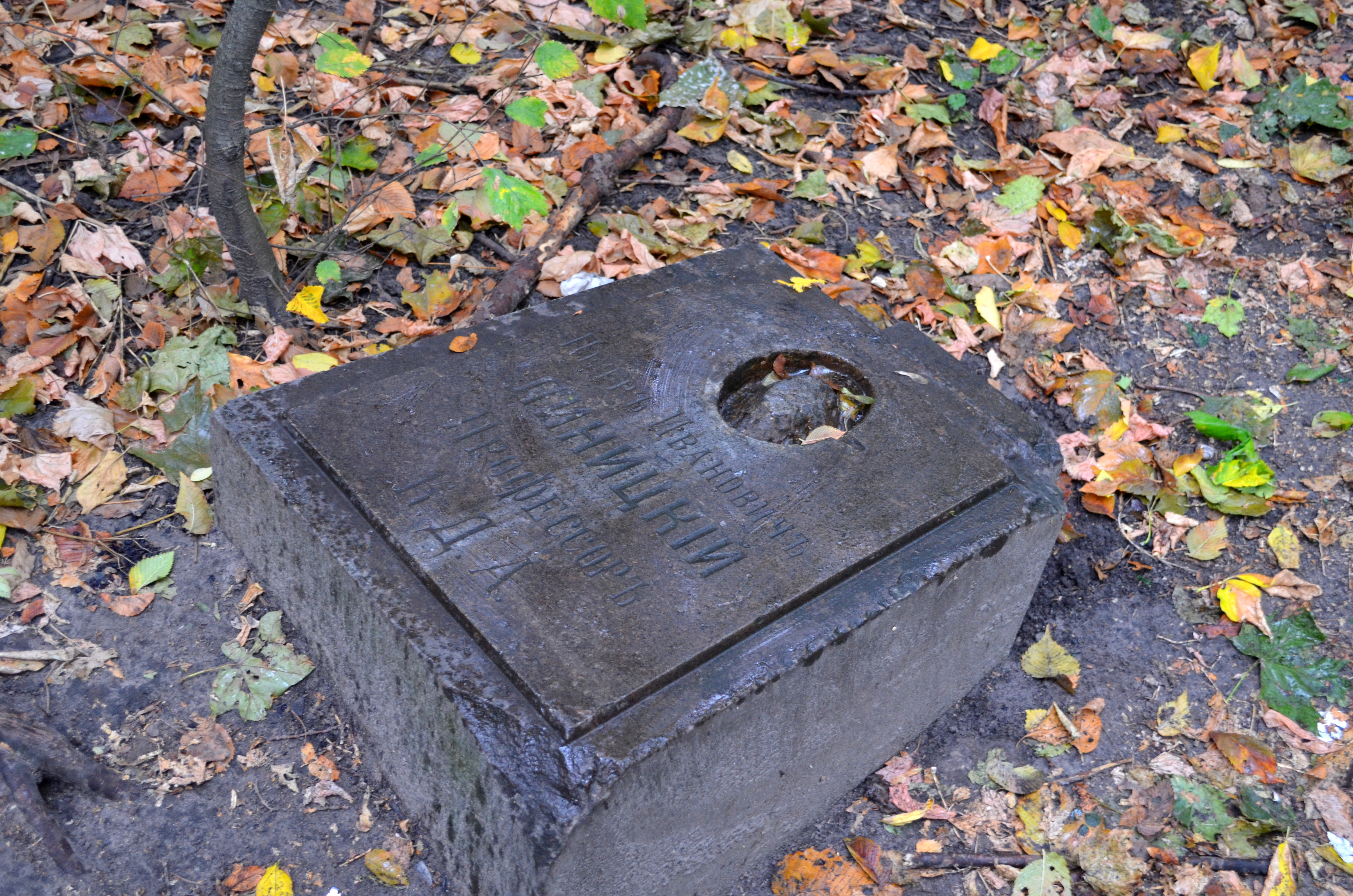 Надгробок Петра Ліницького на кладовищі Флорівського монастиря у Києві